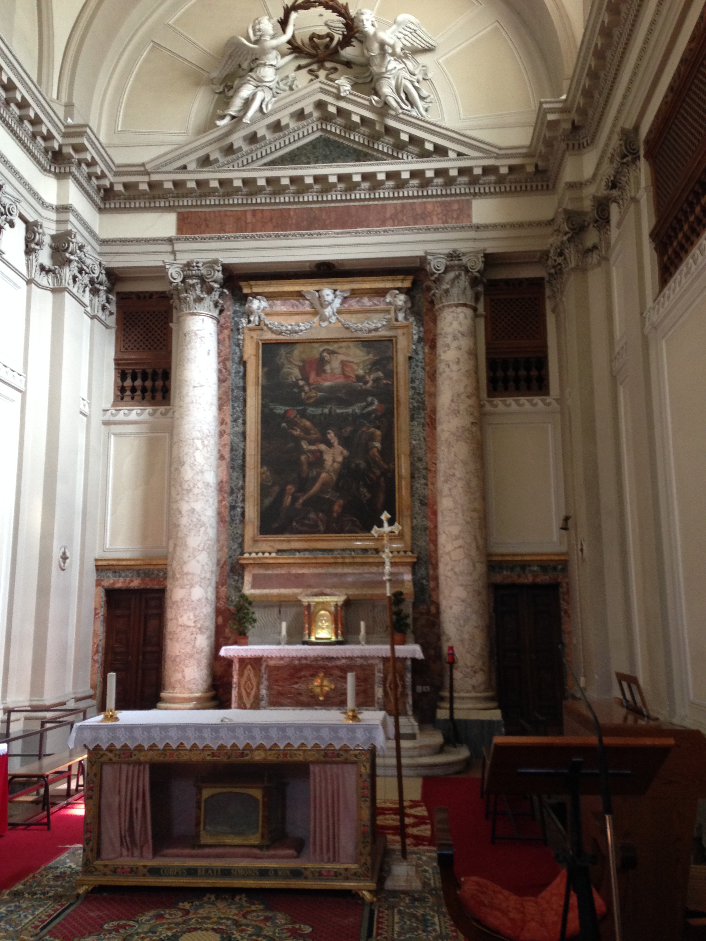 Altare maggiore